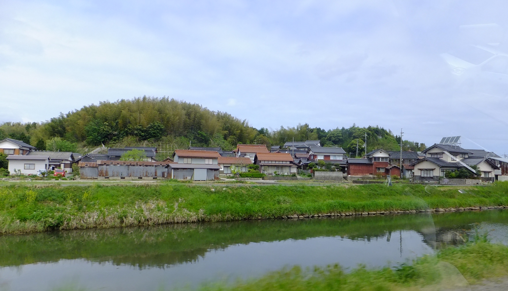 鳥取県東伯郡北栄町瀬戸